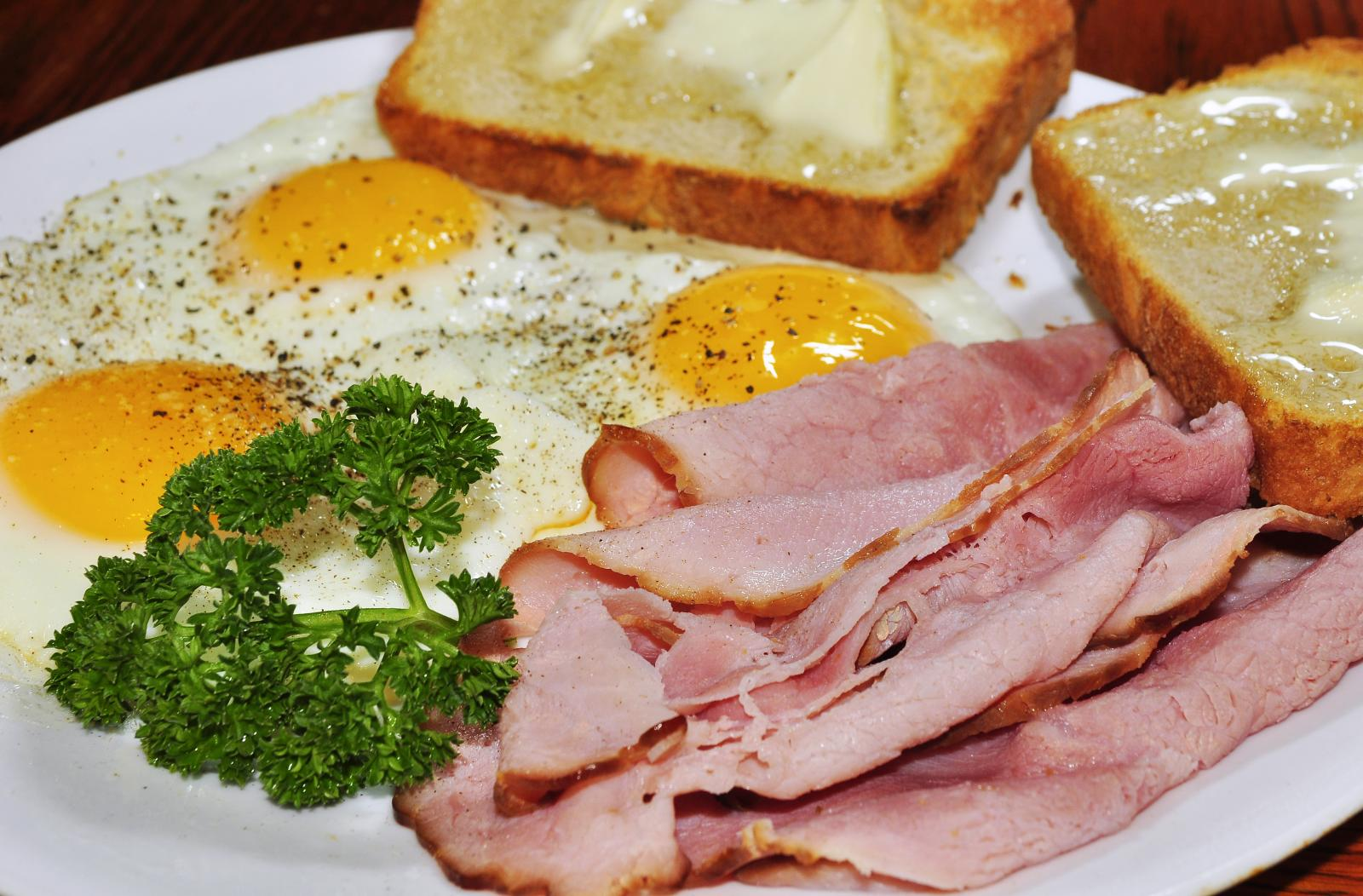 Mmm... ham 'n eggs over easy